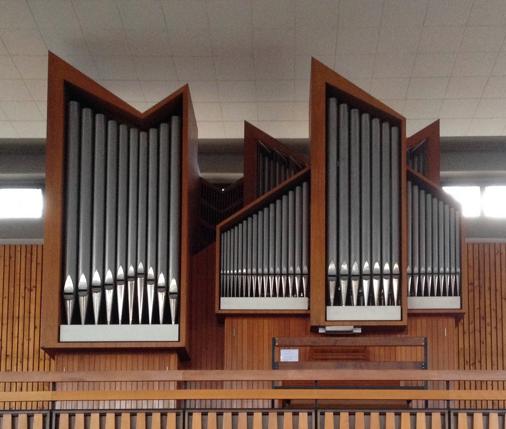 Bad Harzburg, Liebfrauenkirche, Orgel